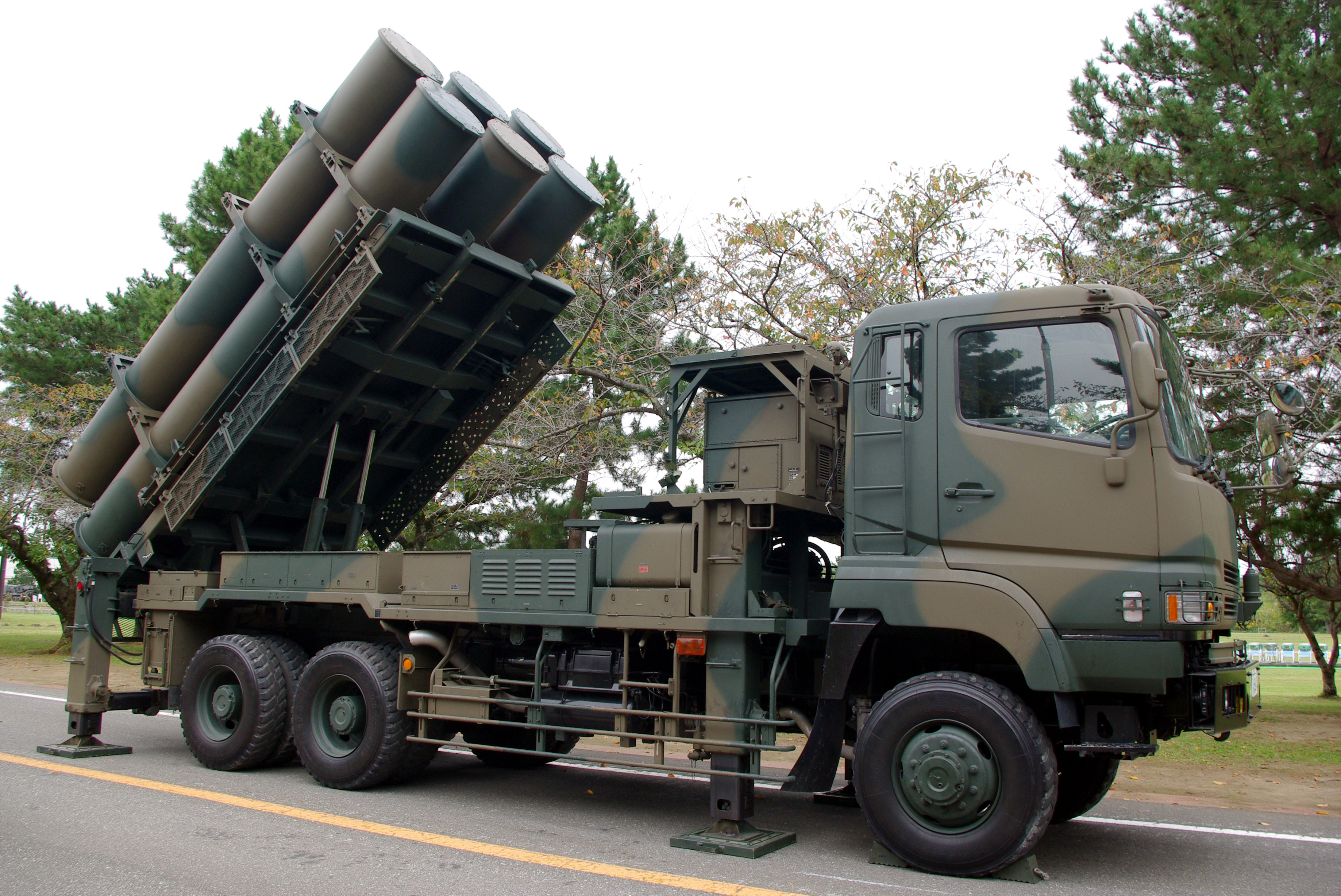 JGSDF Camp-Tsuchiura,Type88 SSM.PD-self.ja:2012年10月14日、投稿者撮影。陸上自衛隊土浦駐屯地創立60周年記念行事。88式地対艦ミサイル、武器学校。